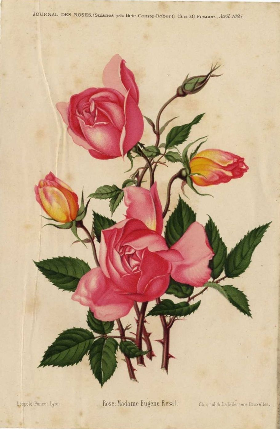 Rose 'Madame Eugène Résal' (Pierre Guillot 1894), illustration de Léopold Poncet dans le numéro d'avril 1895 du Journal des roses.